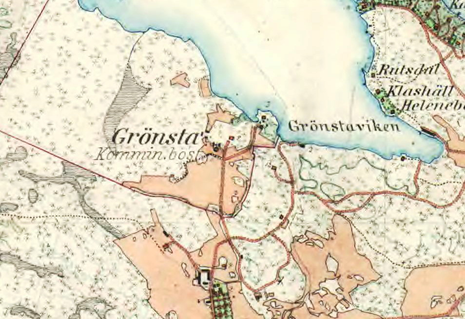 Grönstaområdet kring sekelskiftet 1900